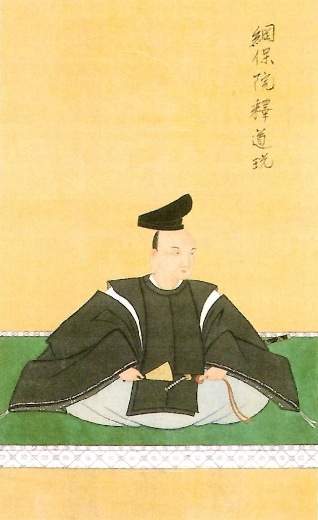 渡辺綱保の肖像。